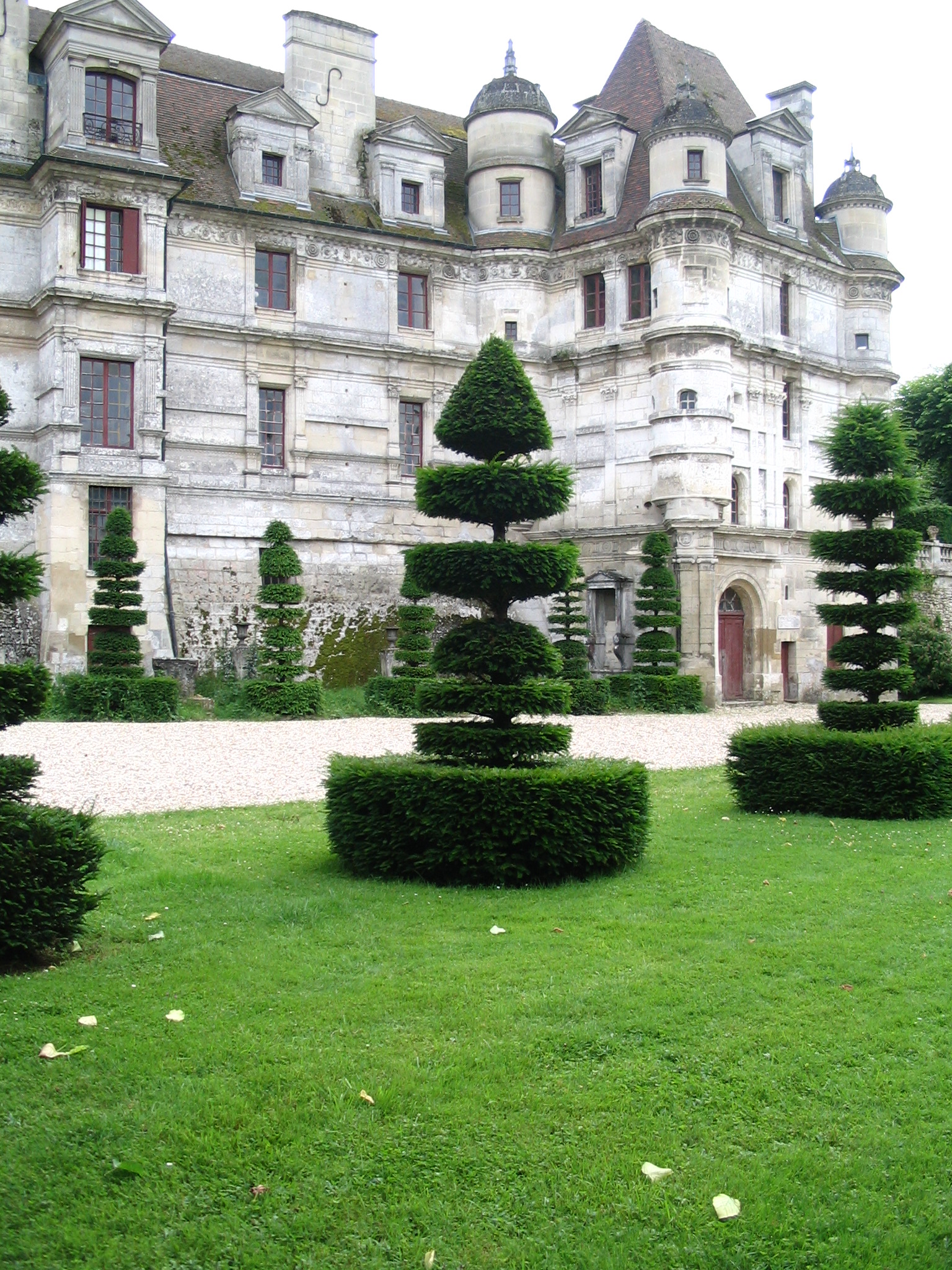 Chateau d'Ambleville, Val d'oise, France